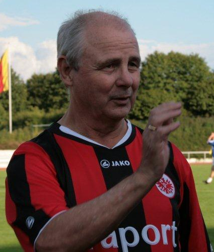 Bernd Hölzenbein at the benefit match KSC Altstars versus Eintracht Frankfurt Altstars on July, 30th 2010 in Karlsruhe